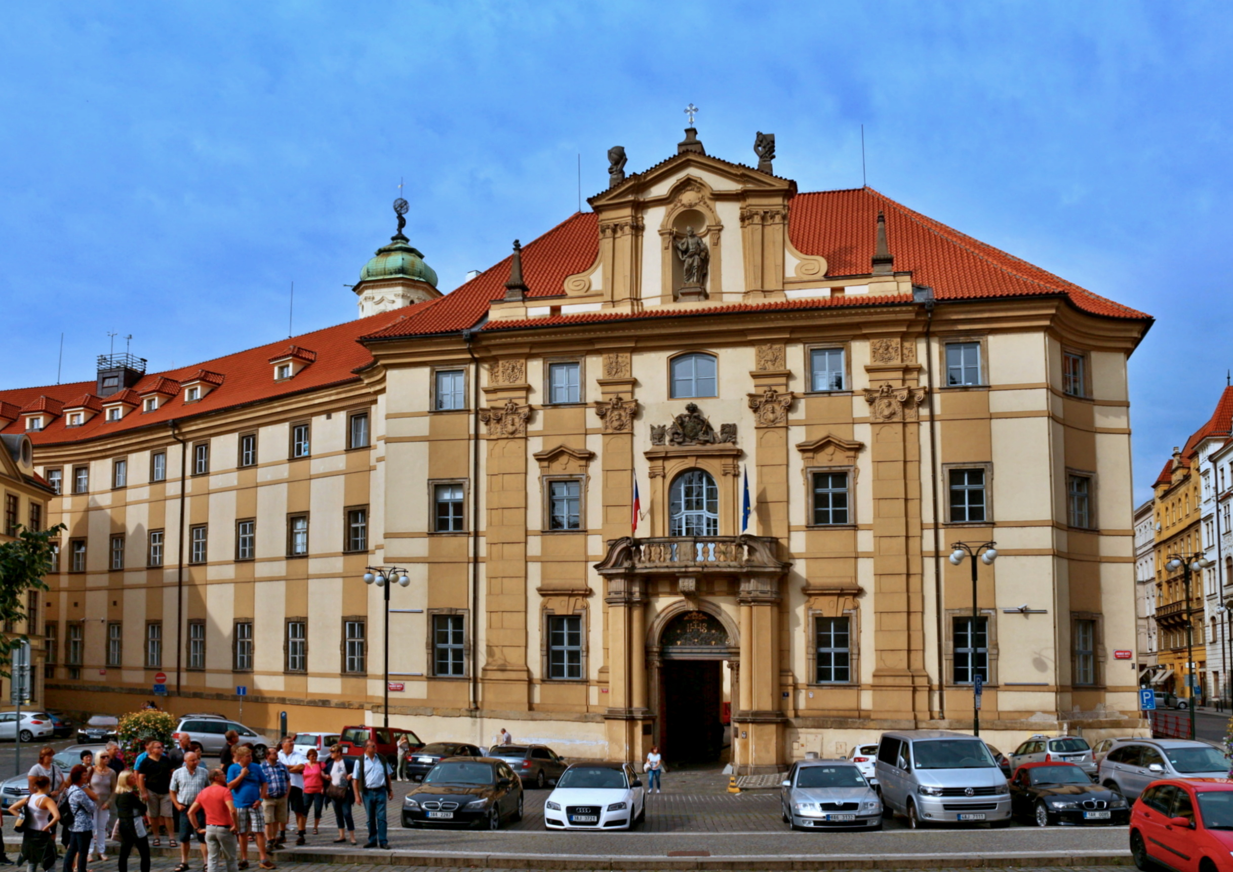 Klementinum